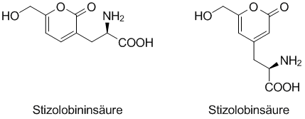 Strukturformeln von Stizolobinin- und Stizolobinsäure